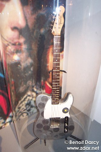 Photos de l'exposition "Pink Floyd Interstellar" à la Cité de la Musique (Porte de la Villette, Paris). Read the story at . Lire le compte-rendu de l'expo sur